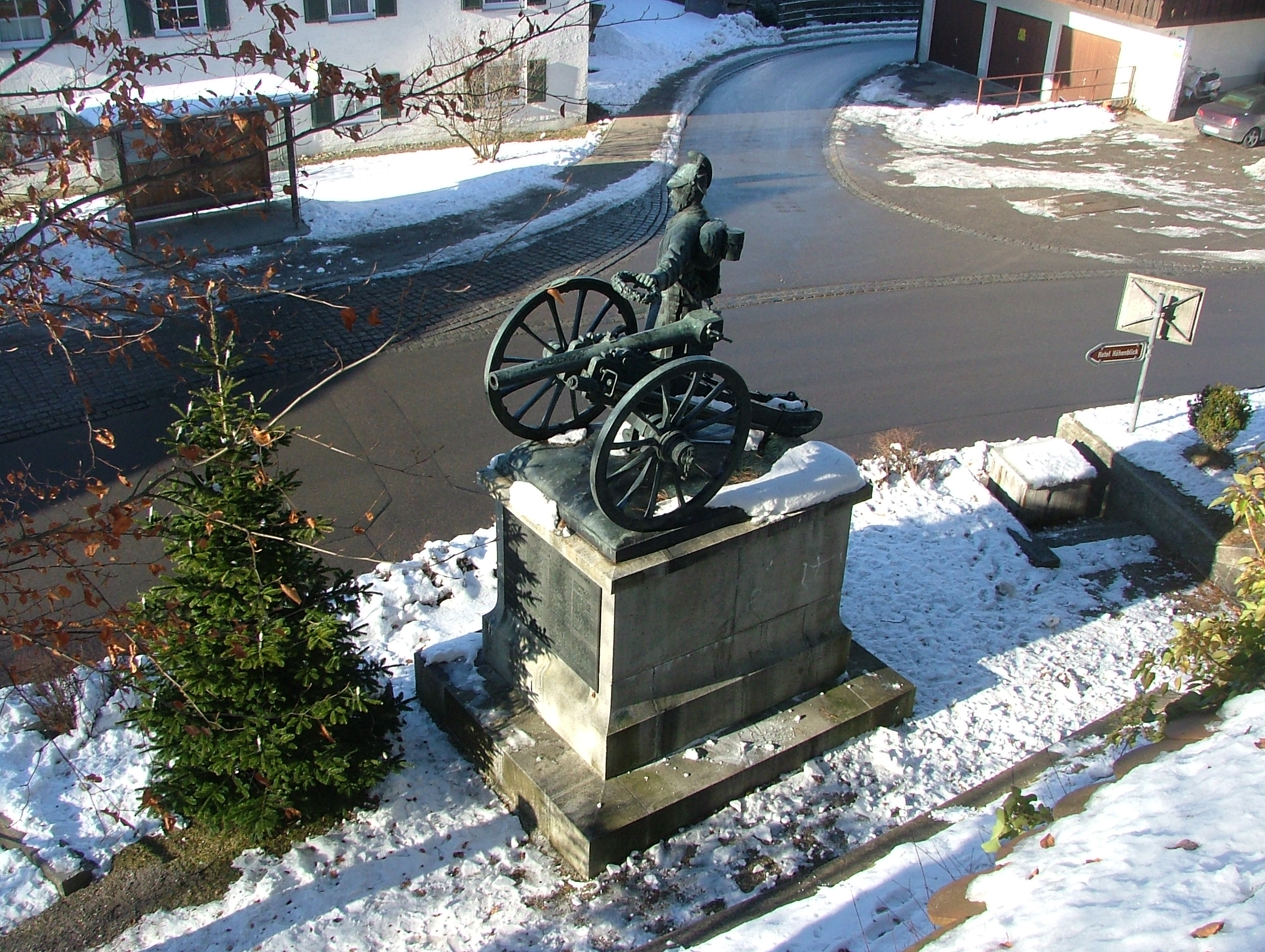 Denkmal für den Krieg 1870 / 71